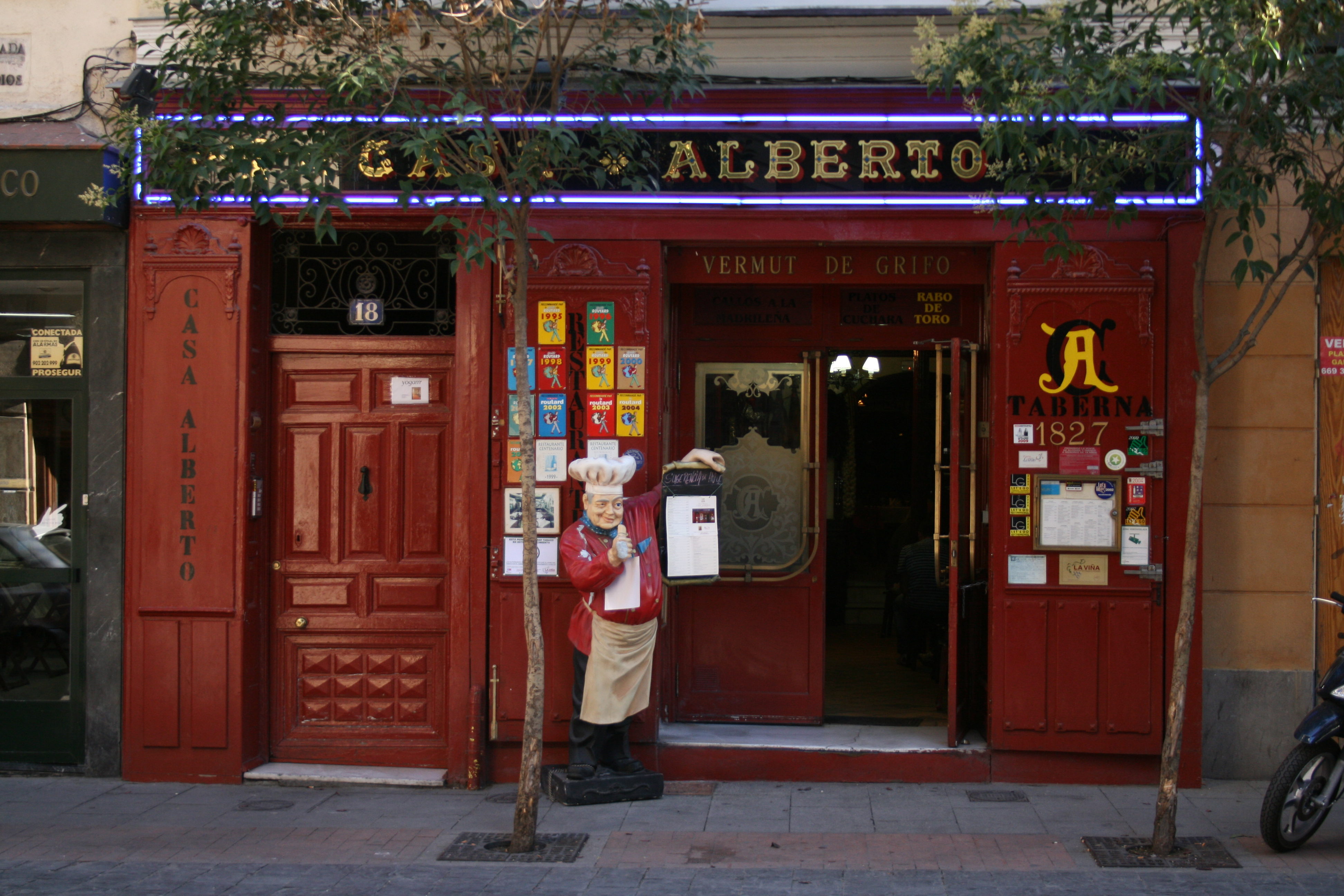 Casa Alberto - Huertas -Madrid